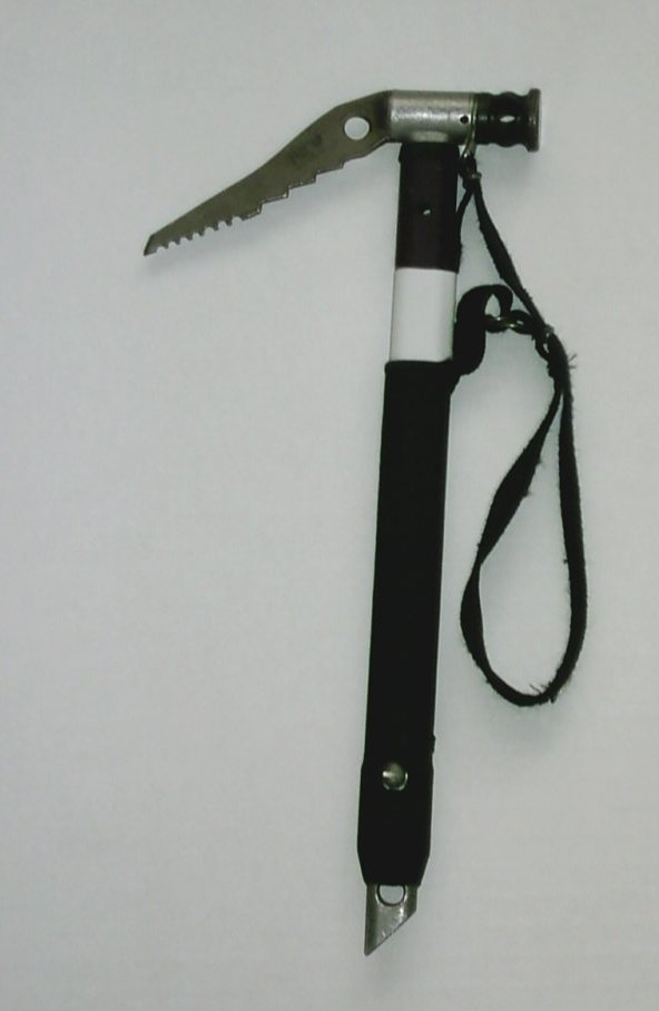 mittlerweile schon etwas altmodisches Eisgerät (wegen des geraden Schafts und der Hauenform) von AustriAlpin mit auswechselbarer Haue und einem Hammerkopf